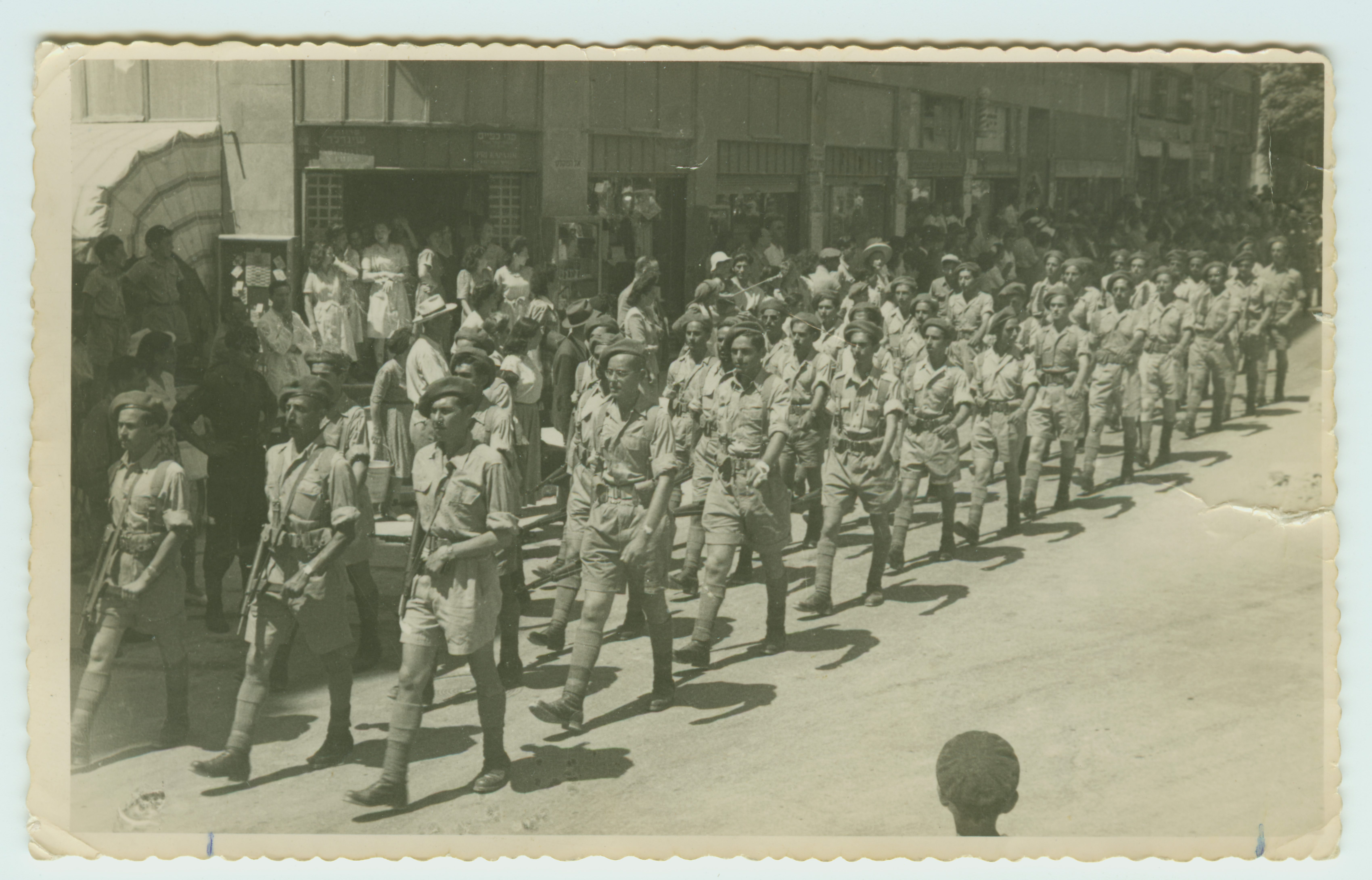 פלוגת יהונתן במצעד ברחוב שטראוס בירושלים בהפוגה הראשונה, יוני 1948